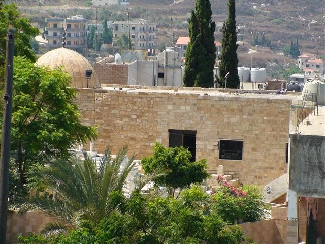 قرية صرفند المهجرة